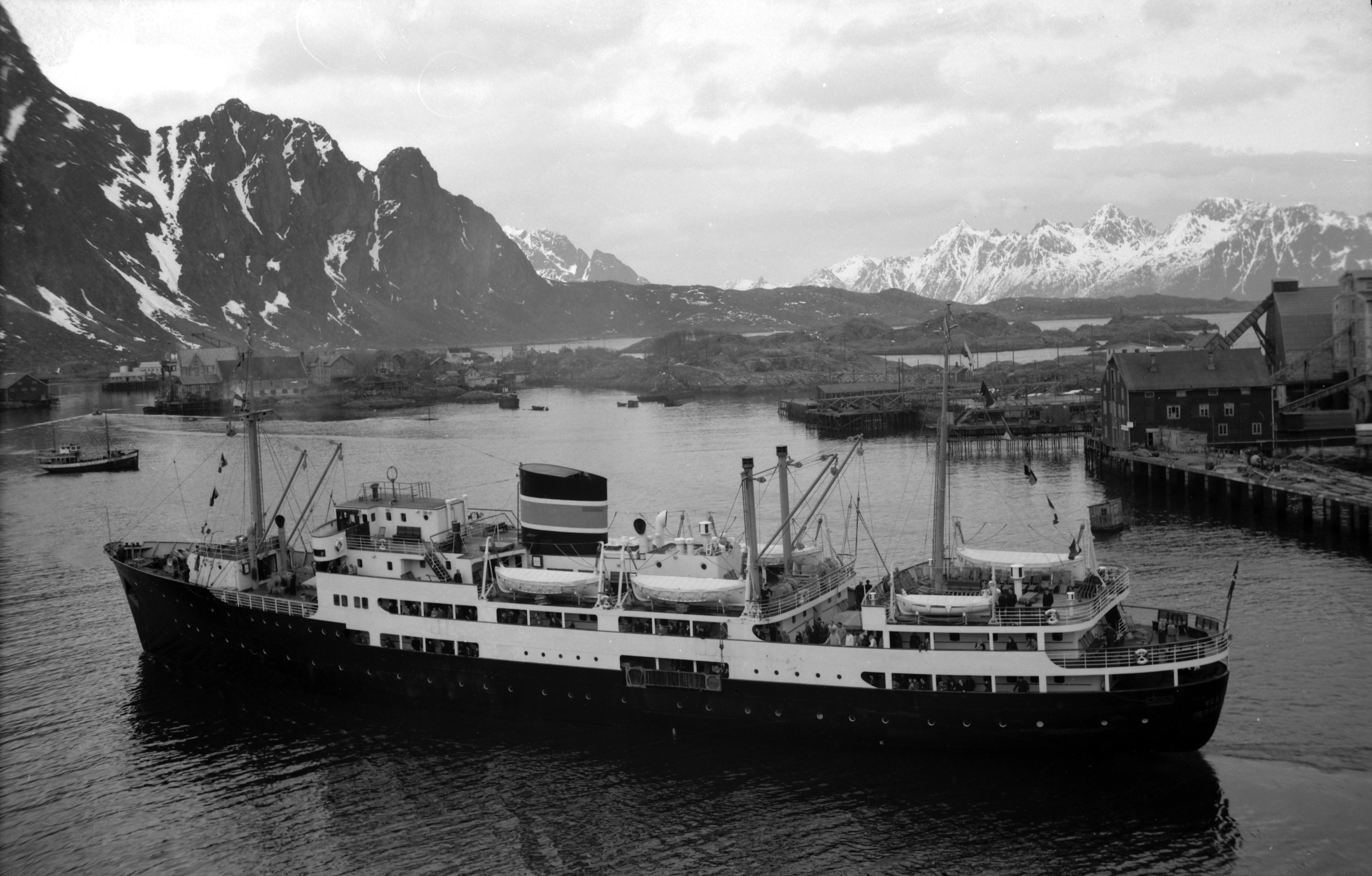 Bildet er hentet fra Nordlandsmuseet bildesamling etter Kanstad. Motivbeskrivelse: Svolvær; skip Sted: Svolvær Nøkkelord: Stedsnavn Båter og fartøyer Dampskip Havnevesen